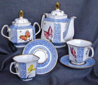 фарфоровые изделья Сысерти